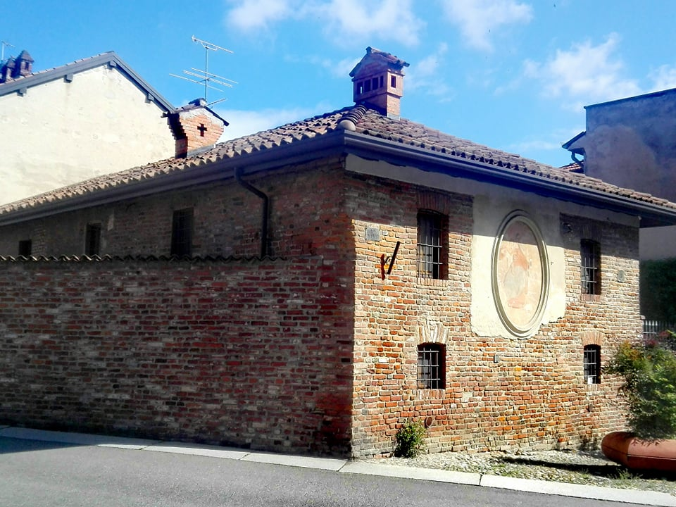 Vigevano, il quattrocentesco mulino della Resega, voluto da Ludovico il Moro ed anticamente adibito a segheria (da qui il nome dialettale "resega"), ora abitazione privata.